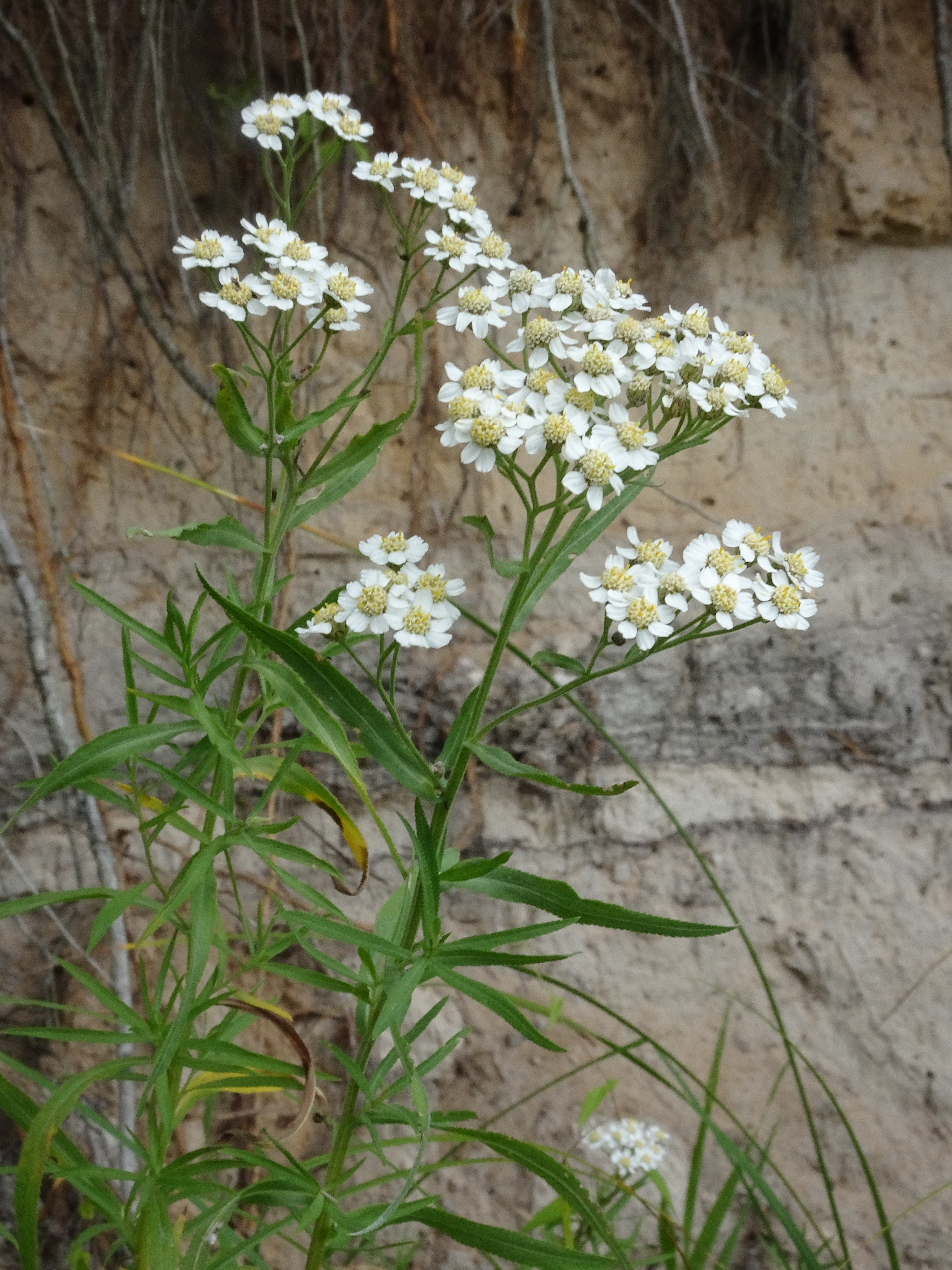 Ida-raudrohi Emajõe ääres Palupõhjas